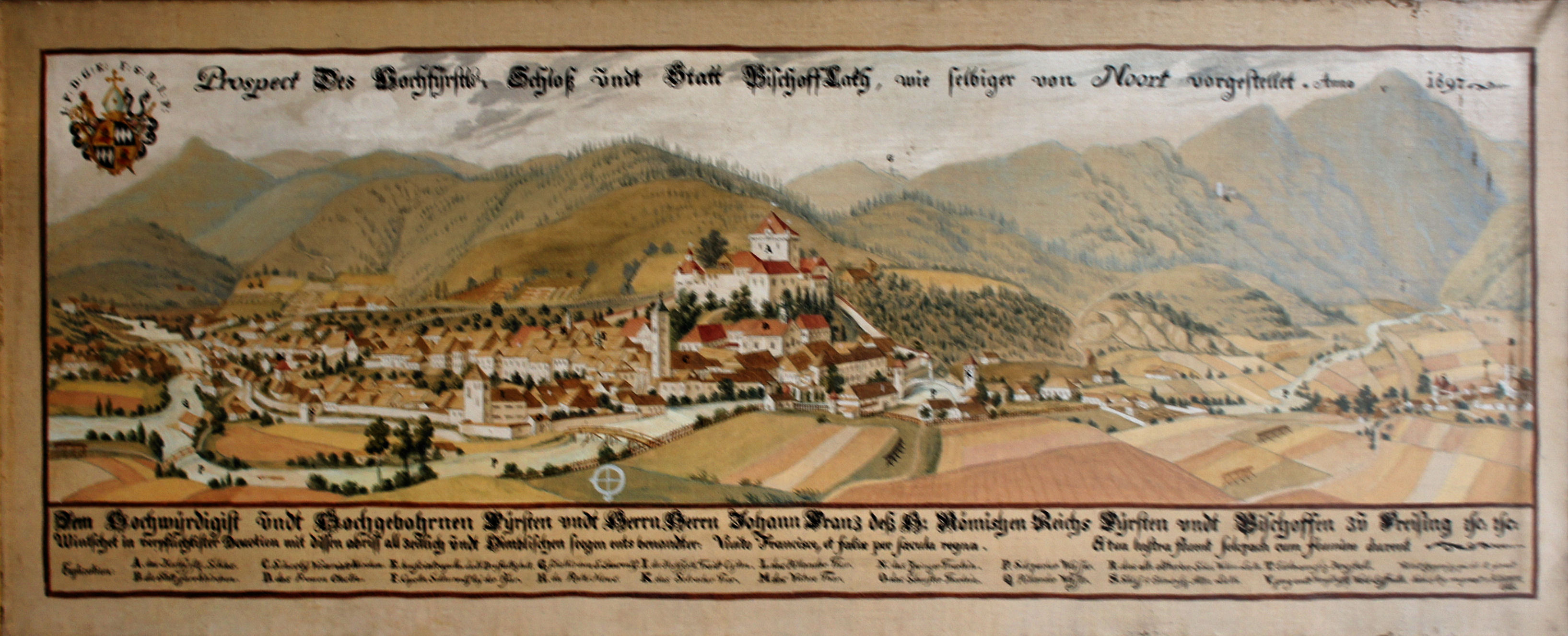 Gemälde aus einer Serie mit Darstellungen von Besitztümern des Hochstifts Freising im Fürstengang zwischen Fürstbischöflicher Residenz und Freisinger Dom.